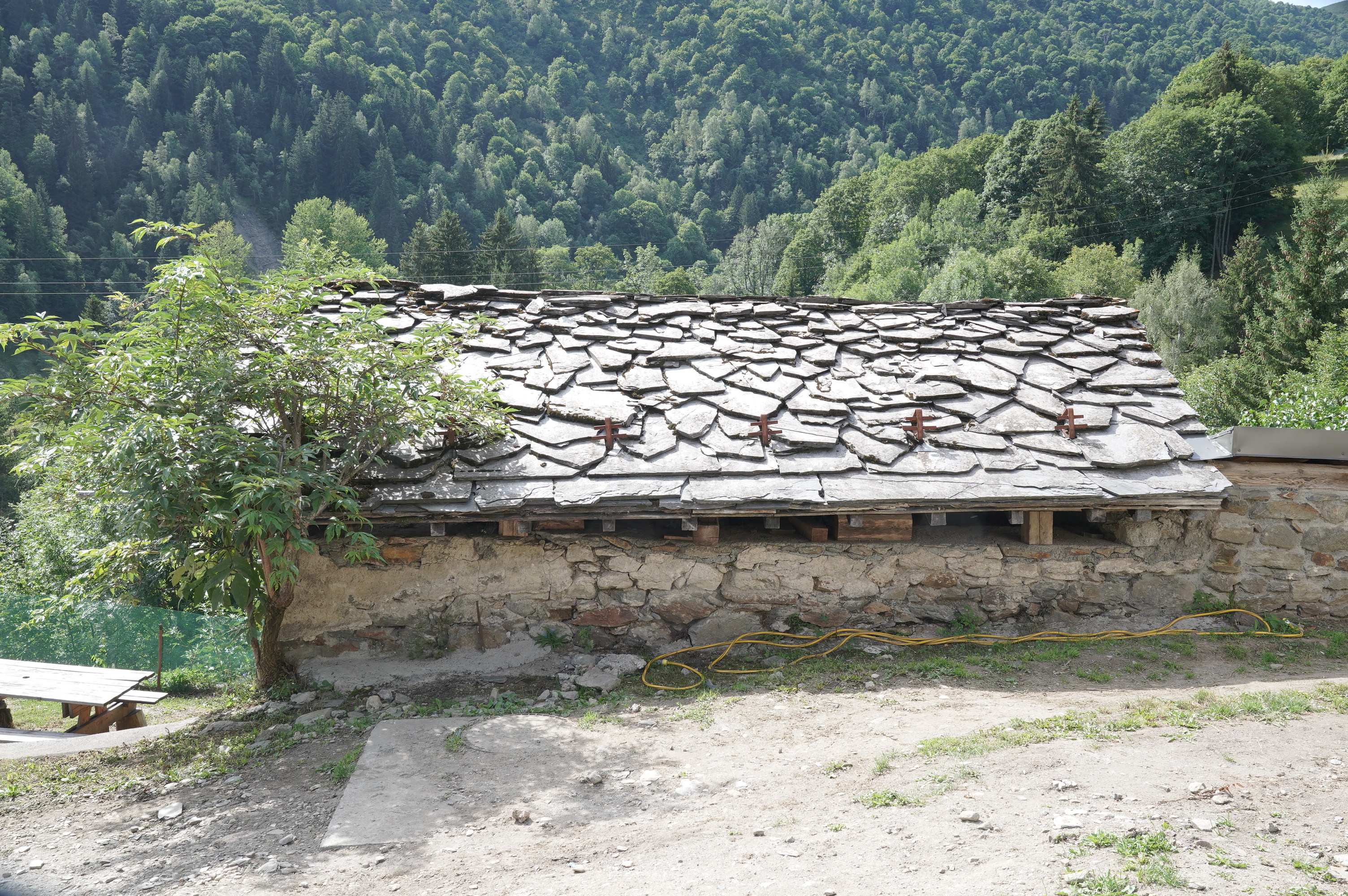 toit de lauze à Celliers sur le for banal